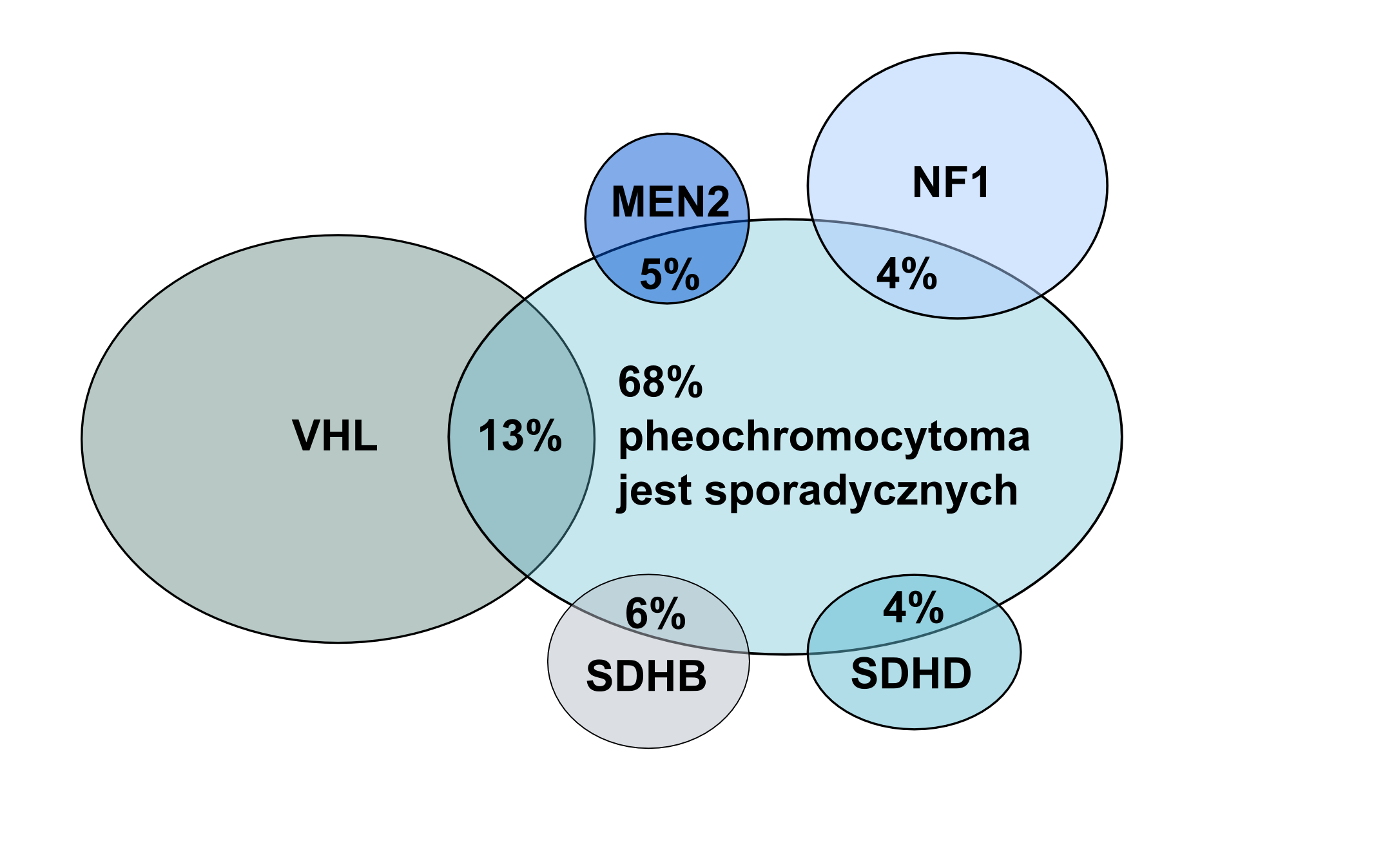 procent rodzinnych guzów chromochłonnych - według najnowszych badań. na podstawie